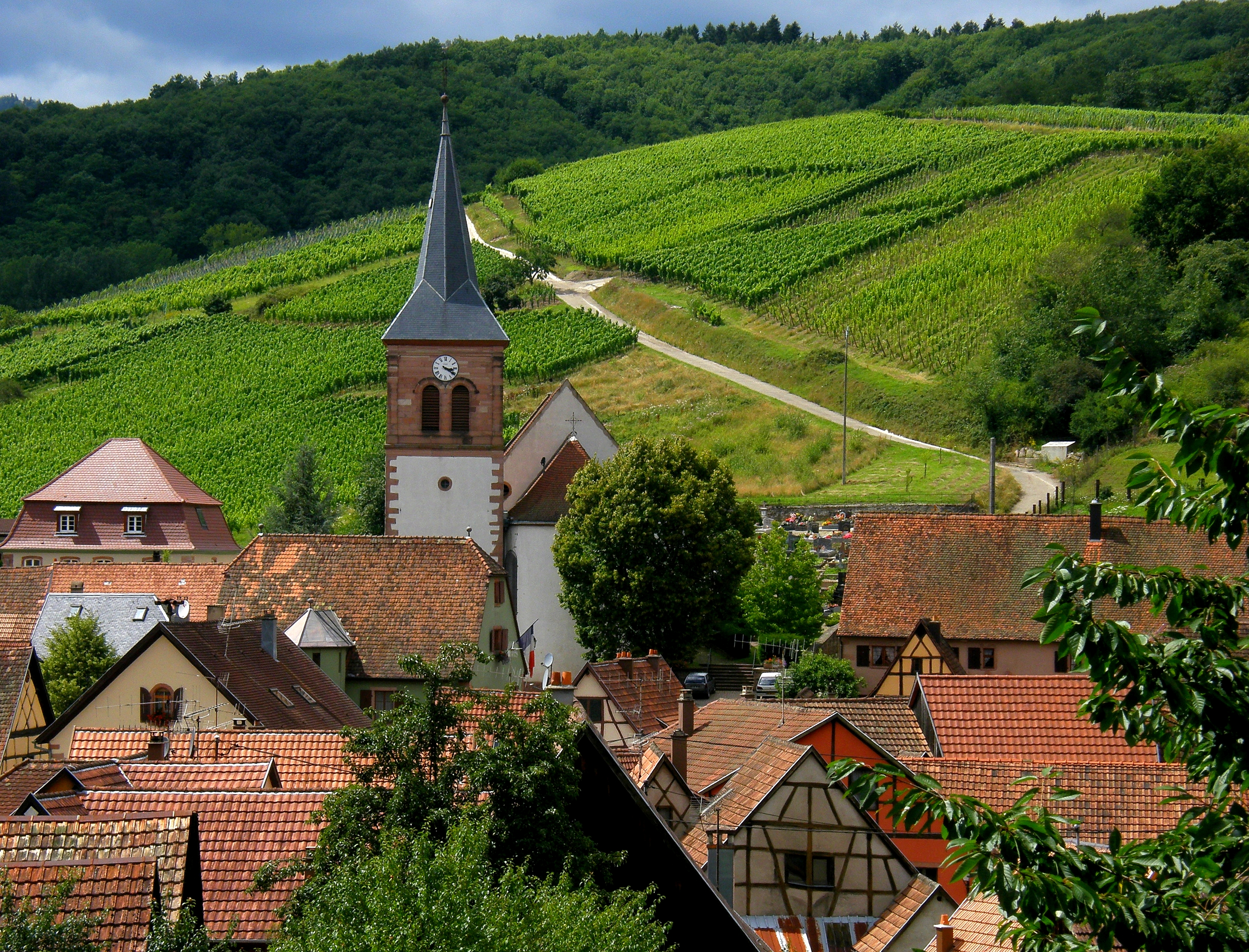 Albé, petit village viticole réputé pour son Pinot Noir. Albé, small wine village renowned for its Black Pinot. Bas-Rhin, Alsace, France.